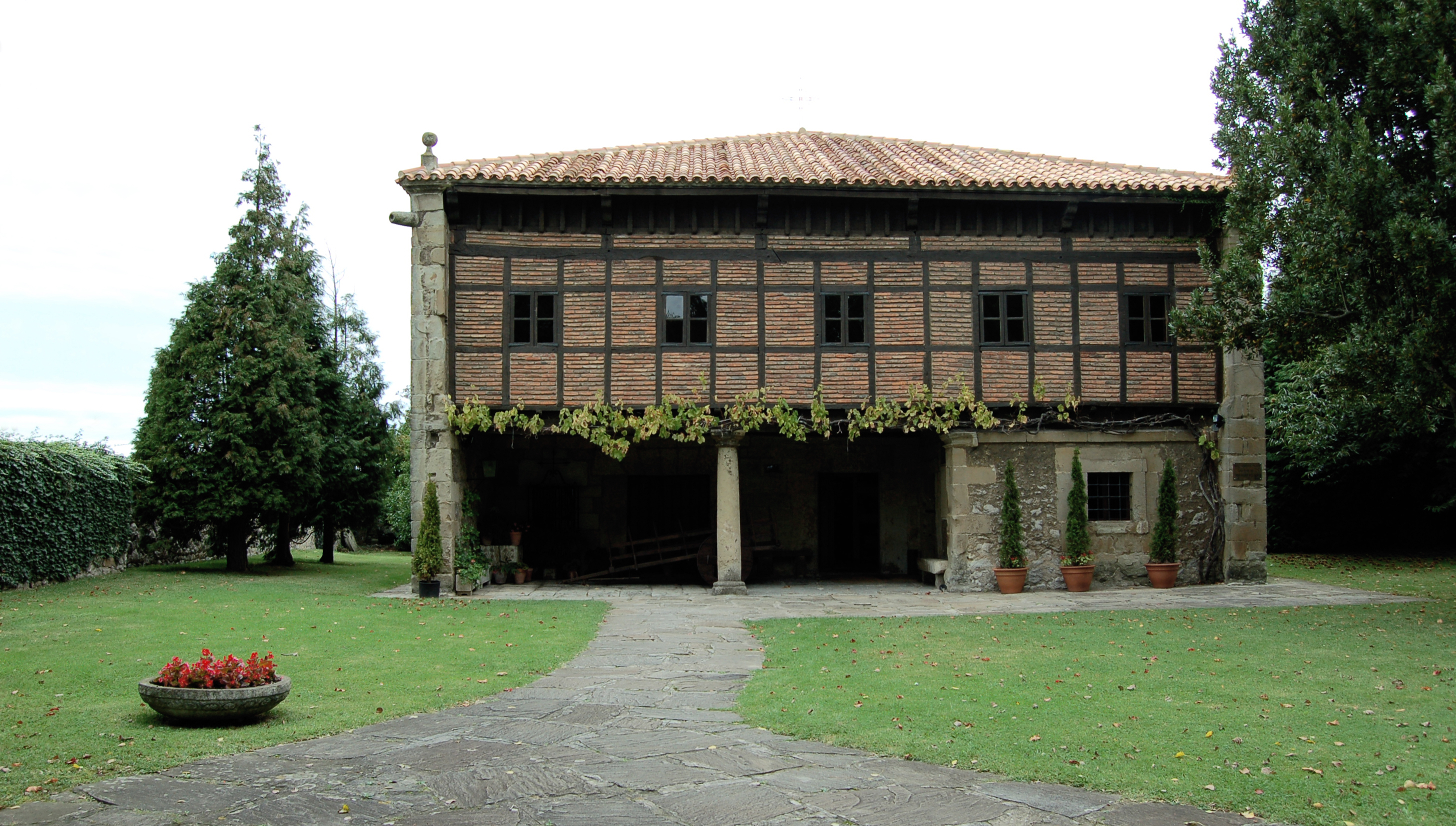 Casa natal de Pedro Velarde y actual Museo Etnográfico de Cantabria, en Muriedas (Cantabria, España).